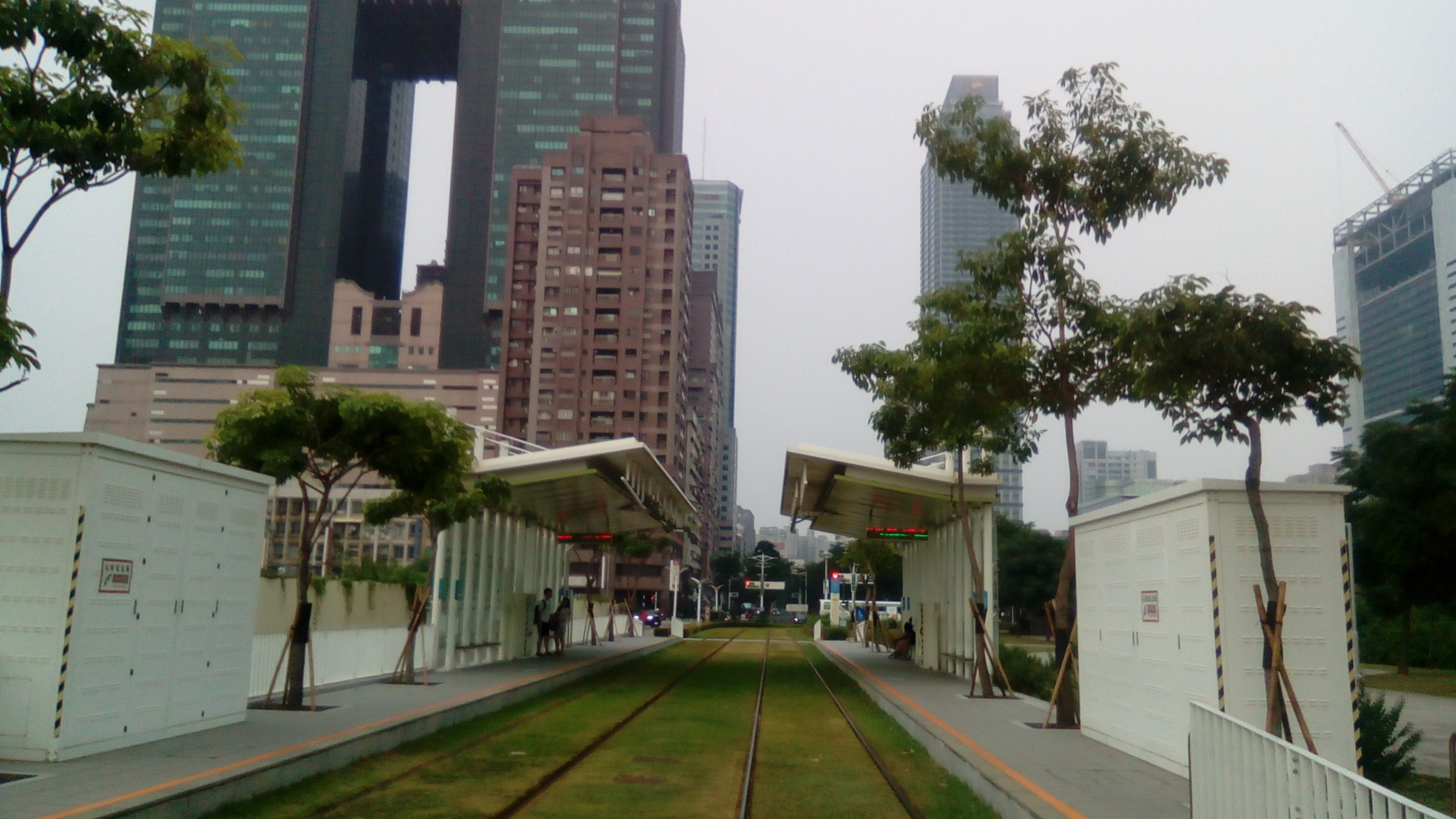 新光碼頭